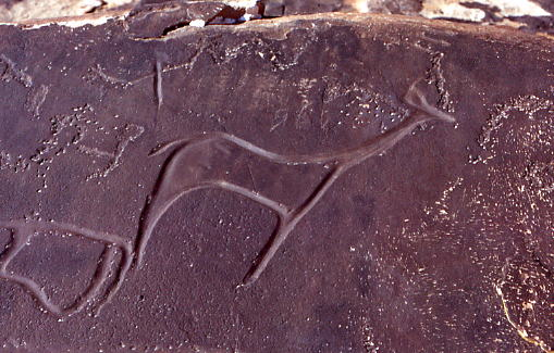 Gravures préhistoriques de Taghit (Algérie)